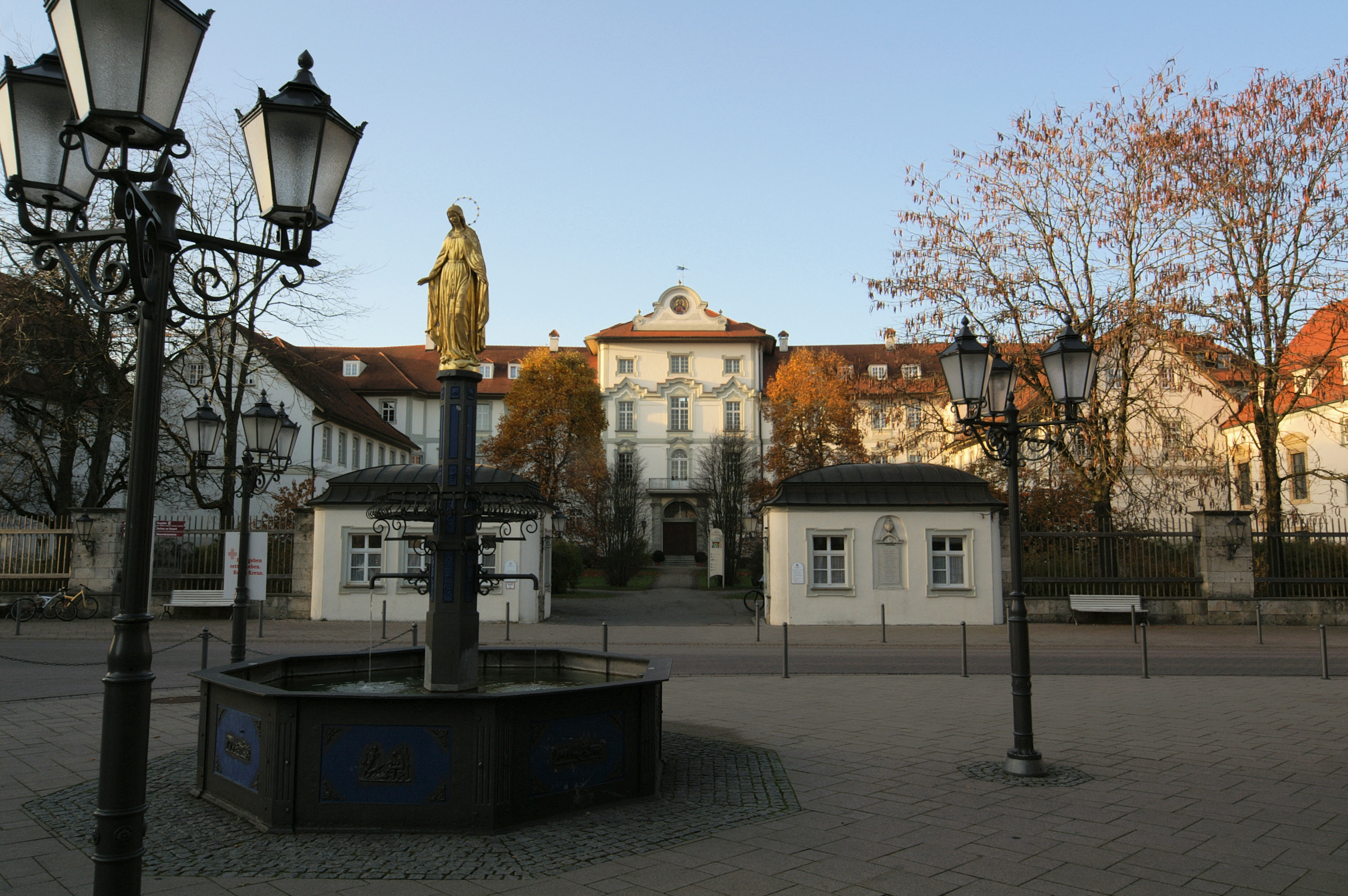 Bad Wurzacher Schloß, im Vordergrund Stadtbrunnen